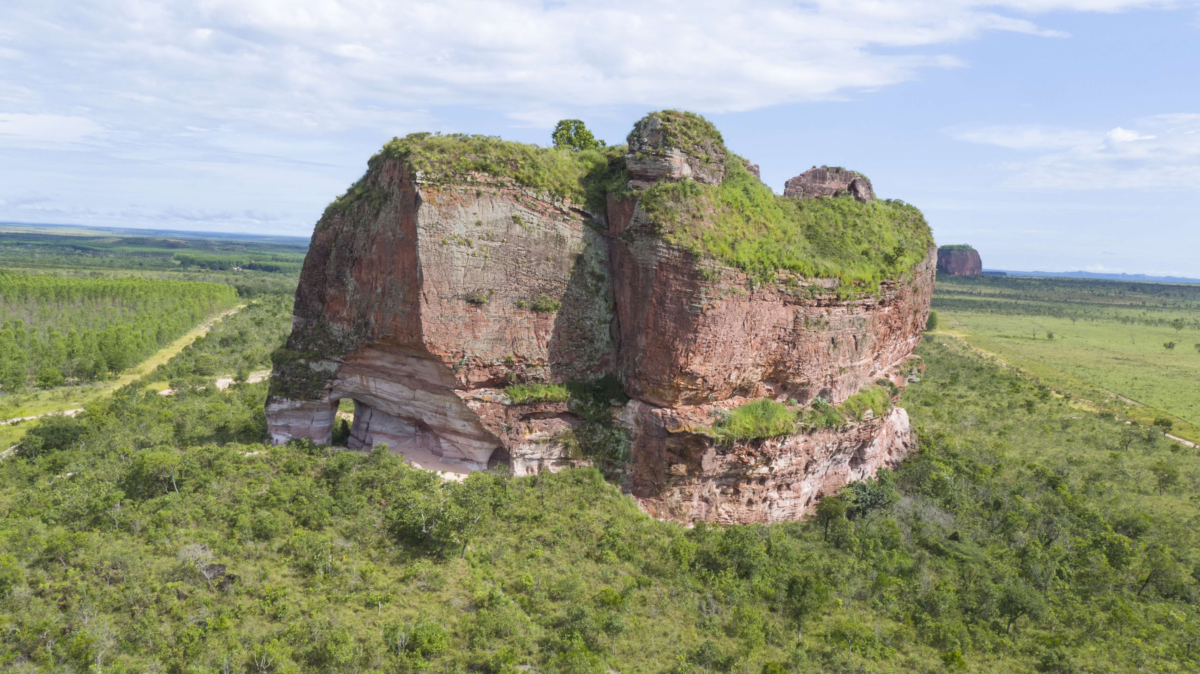 Crédito obrigatório: Flávio André - MTUR